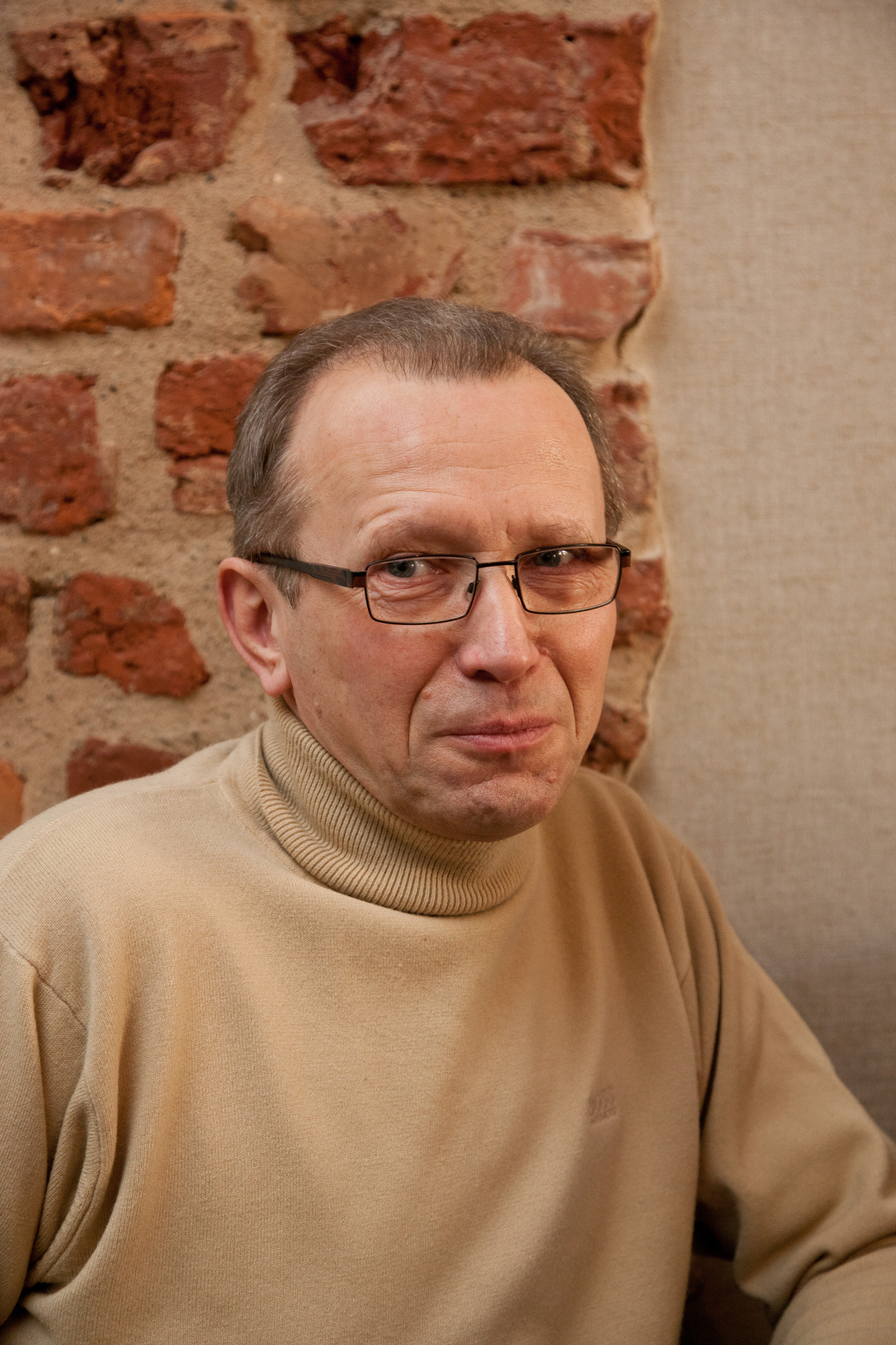 TÜ kultuurisemiootika professor Peeter Torop.